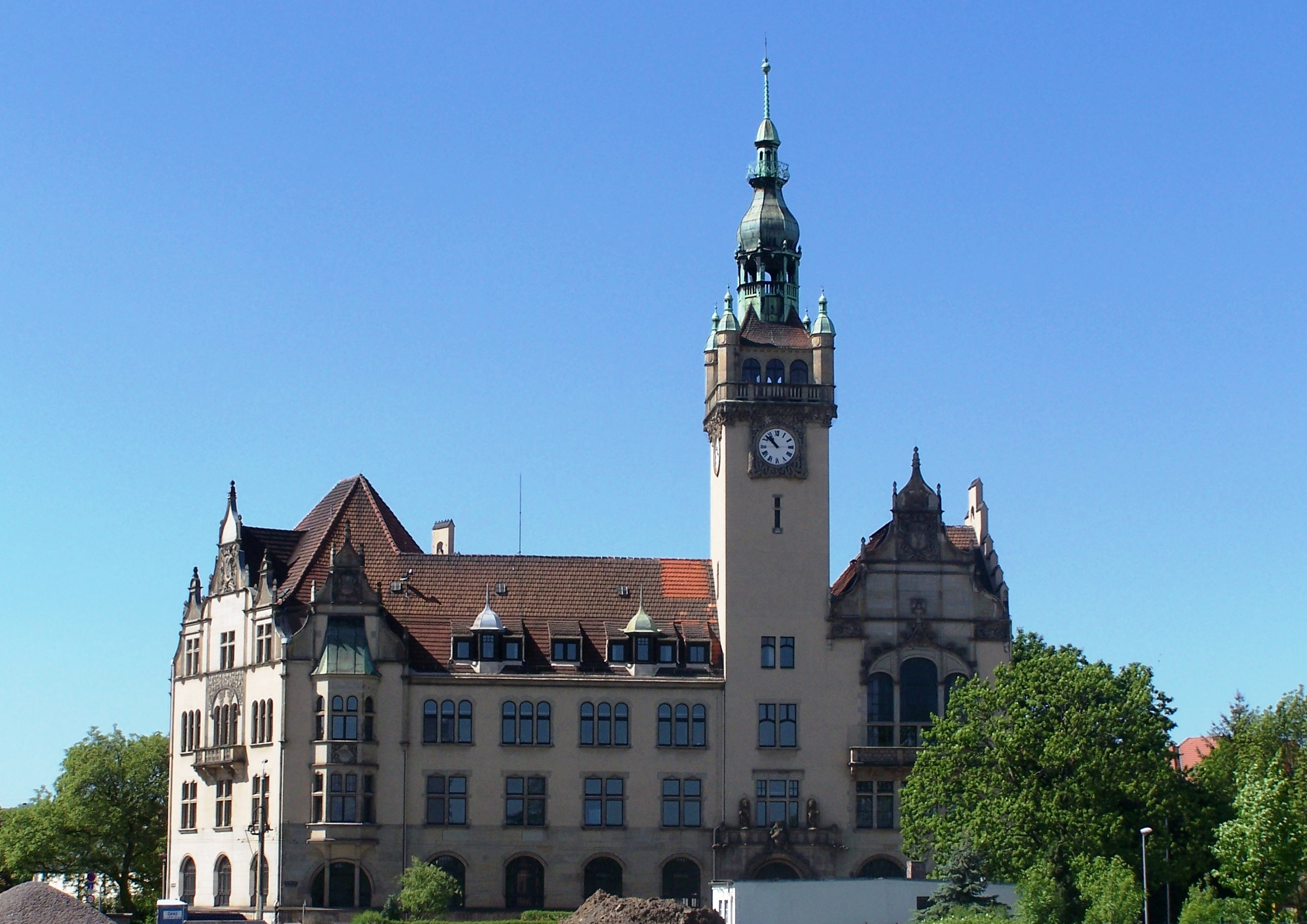 Rathaus von Cotta im heutigen Stadtteil Dresden-Cotta